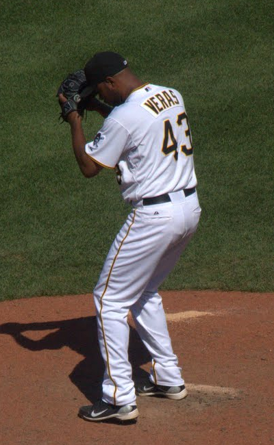 José Veras